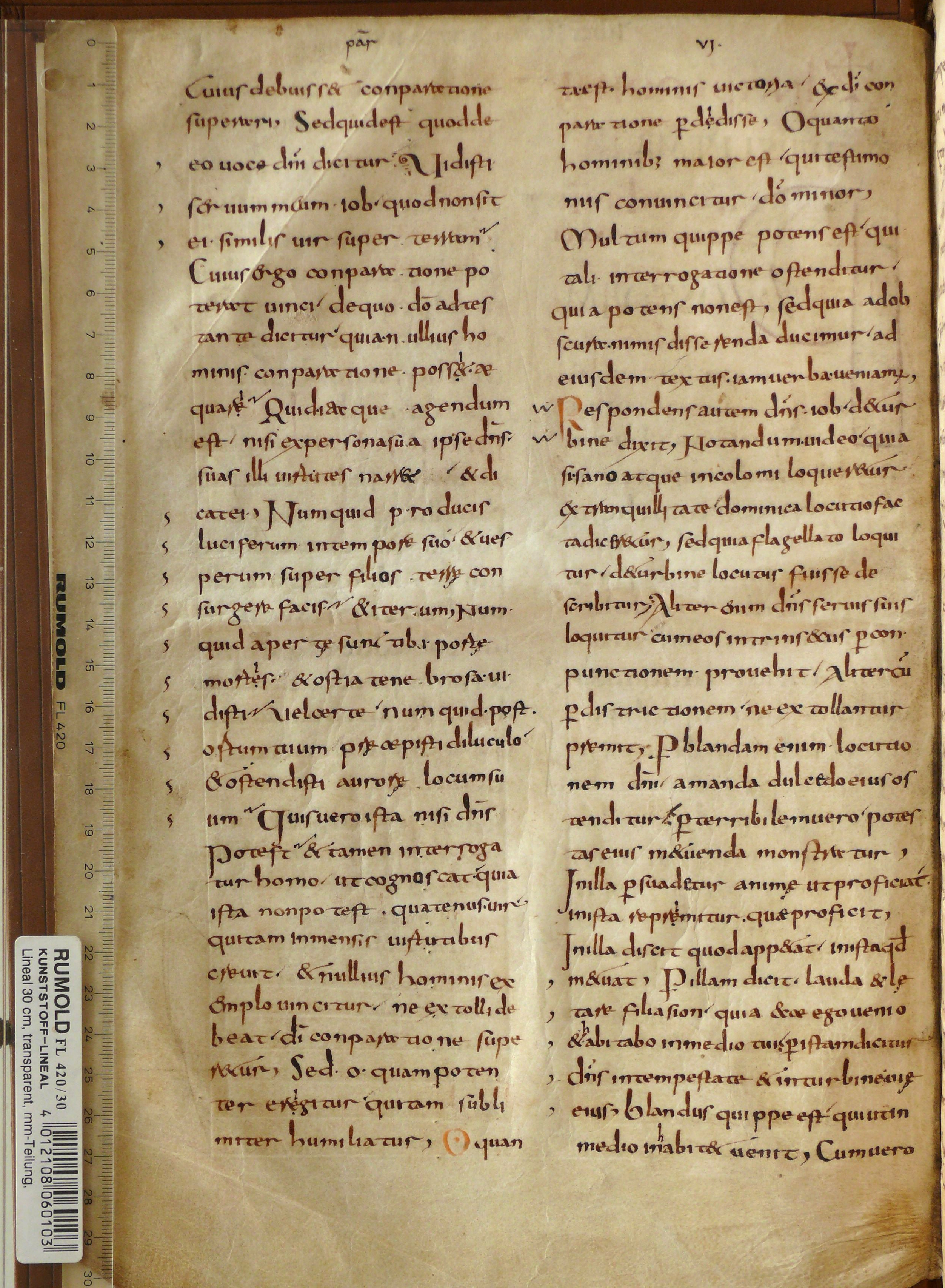 Berlin Staatsbibliothek Preussischer Kulturbesitz theol lat fol 354 (Gregorius Magnus: Moralia in Iob), fol 1v mit karolingischer Minuskel aus der Zeit vor Karl dem Großen